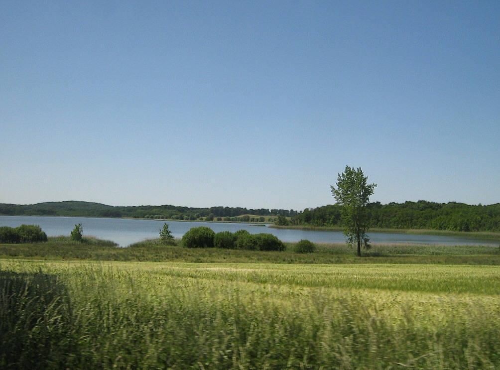 Der Groß Upahler See im Gebiet der Gemeinden Gülzow-Prüzen und Klein Upahl im Landkreis Güstrow in Mecklenburg.